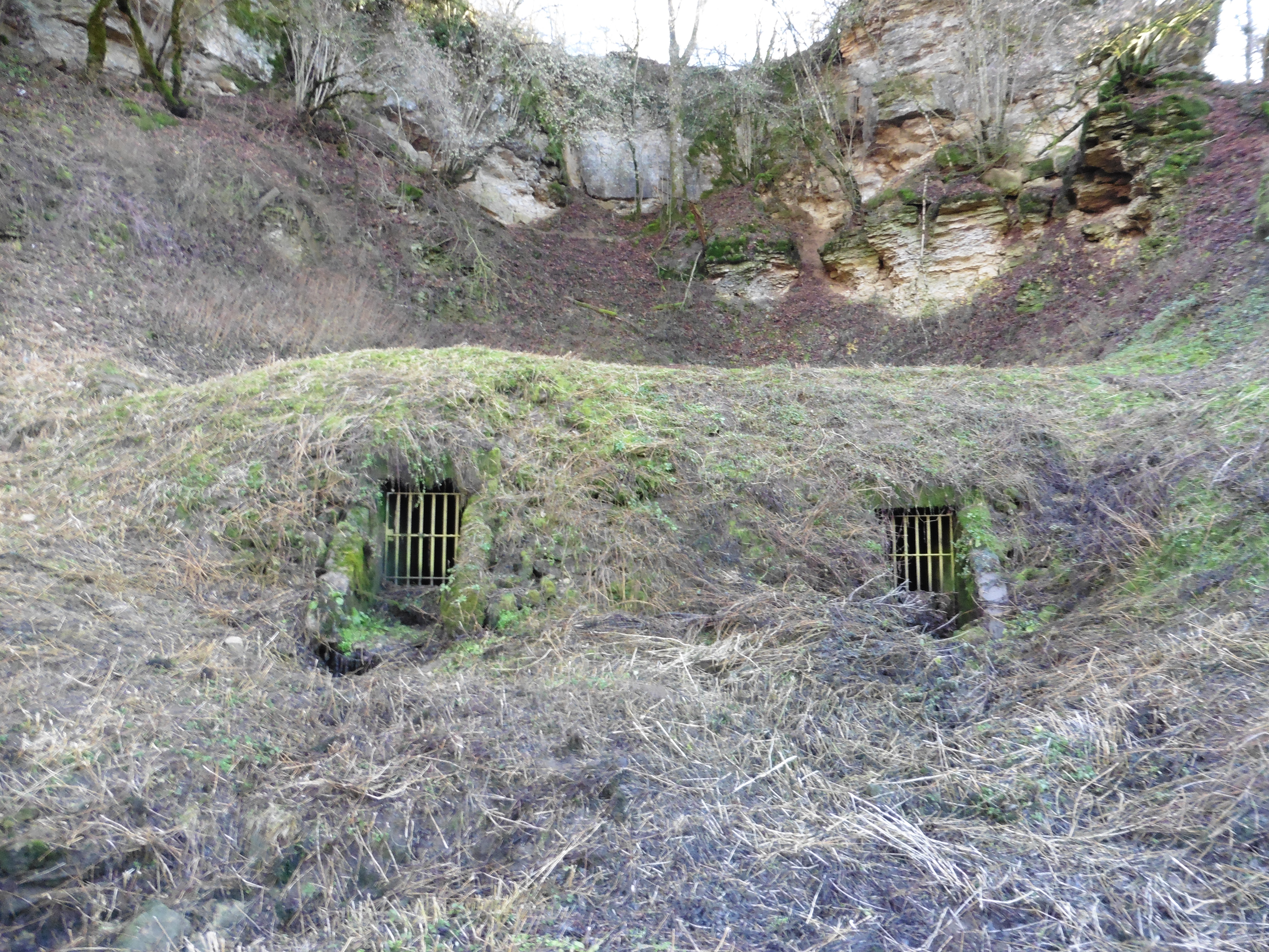 Poljé